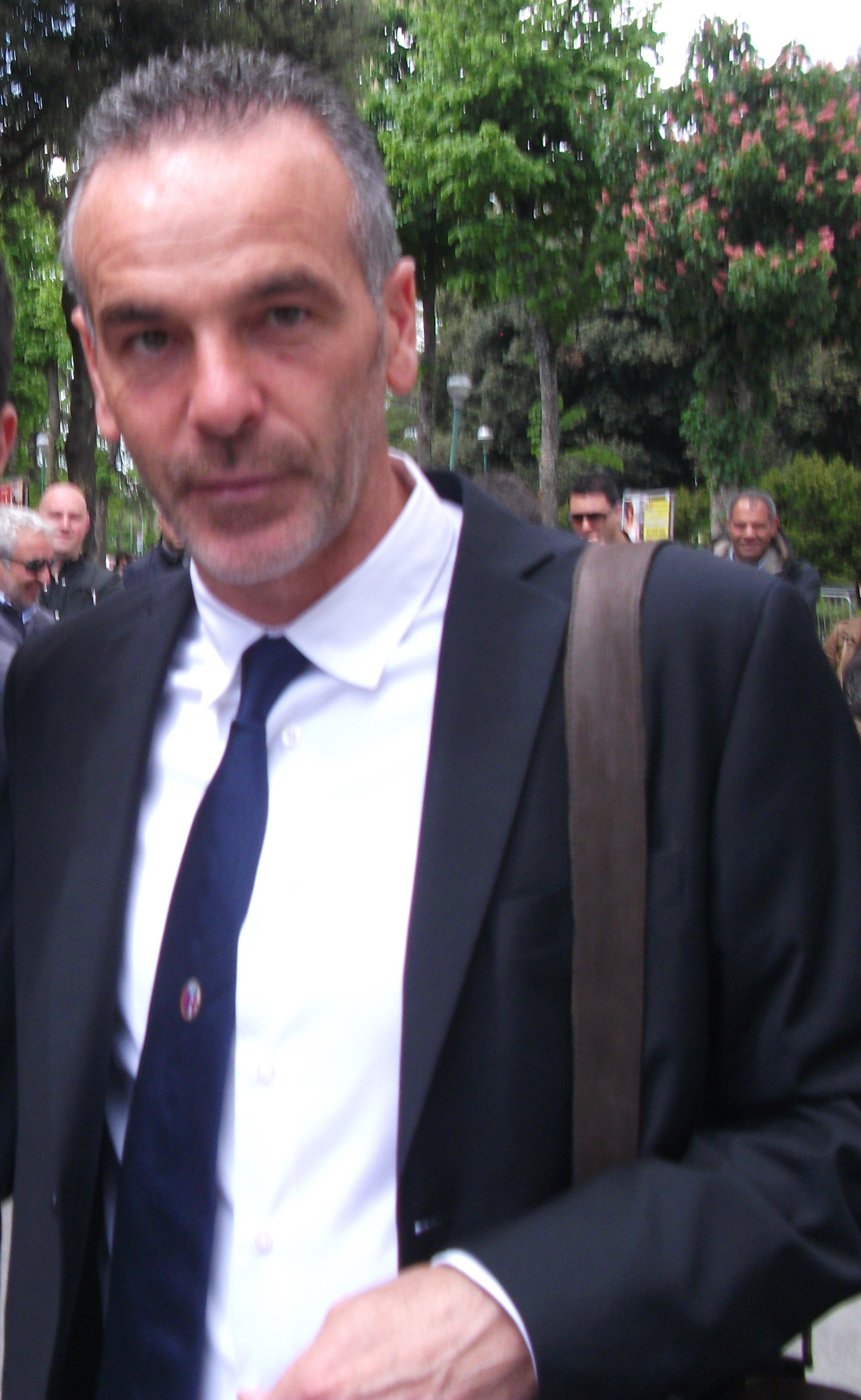 Stefano Pioli, allenatore del Bologna, prima della partita di Serie A, Siena - Bologna del 25 aprile 2012.